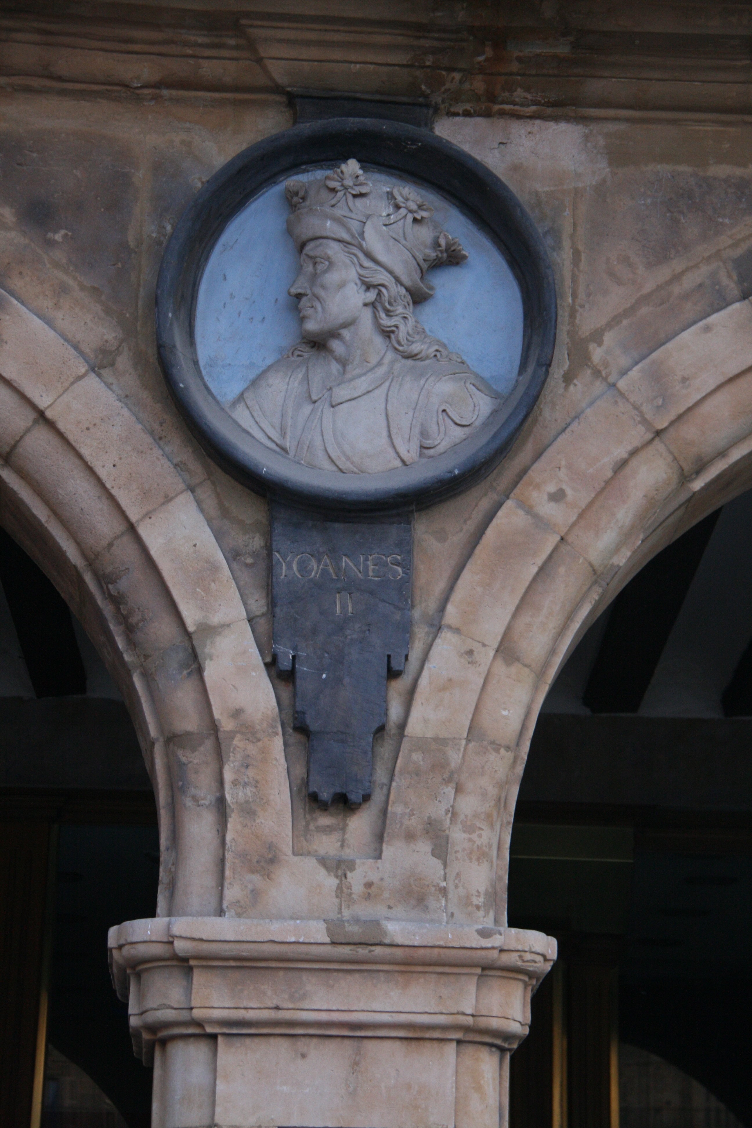 Juan II de Castilla en el Pabellón Real de la Plaza Mayor de Salamanca